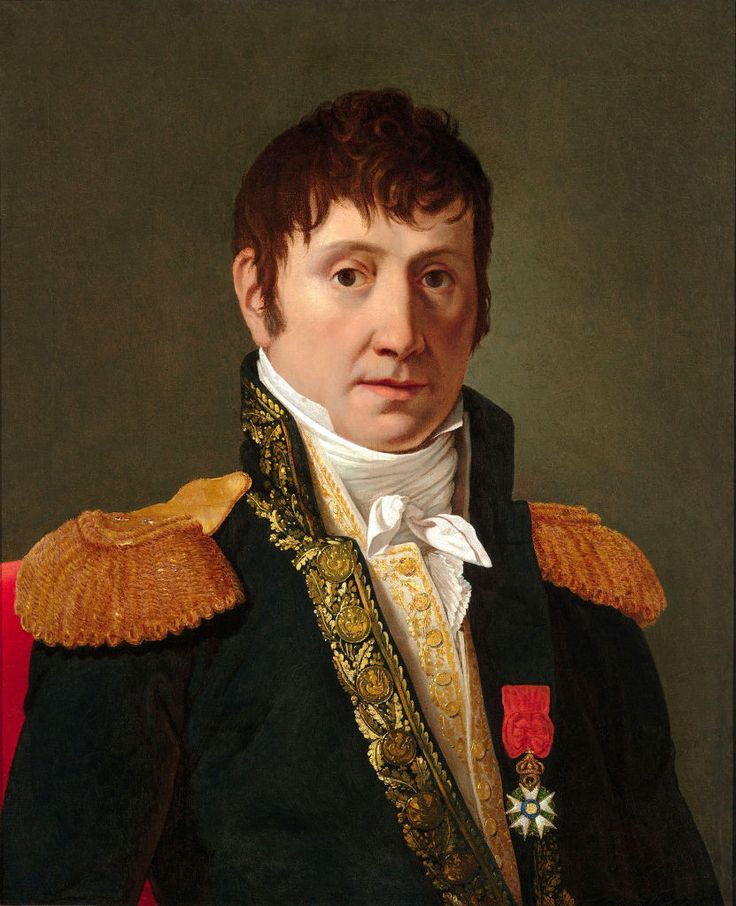 Le maréchal Jean-de-Dieu Soult, duc de Dalmatie.